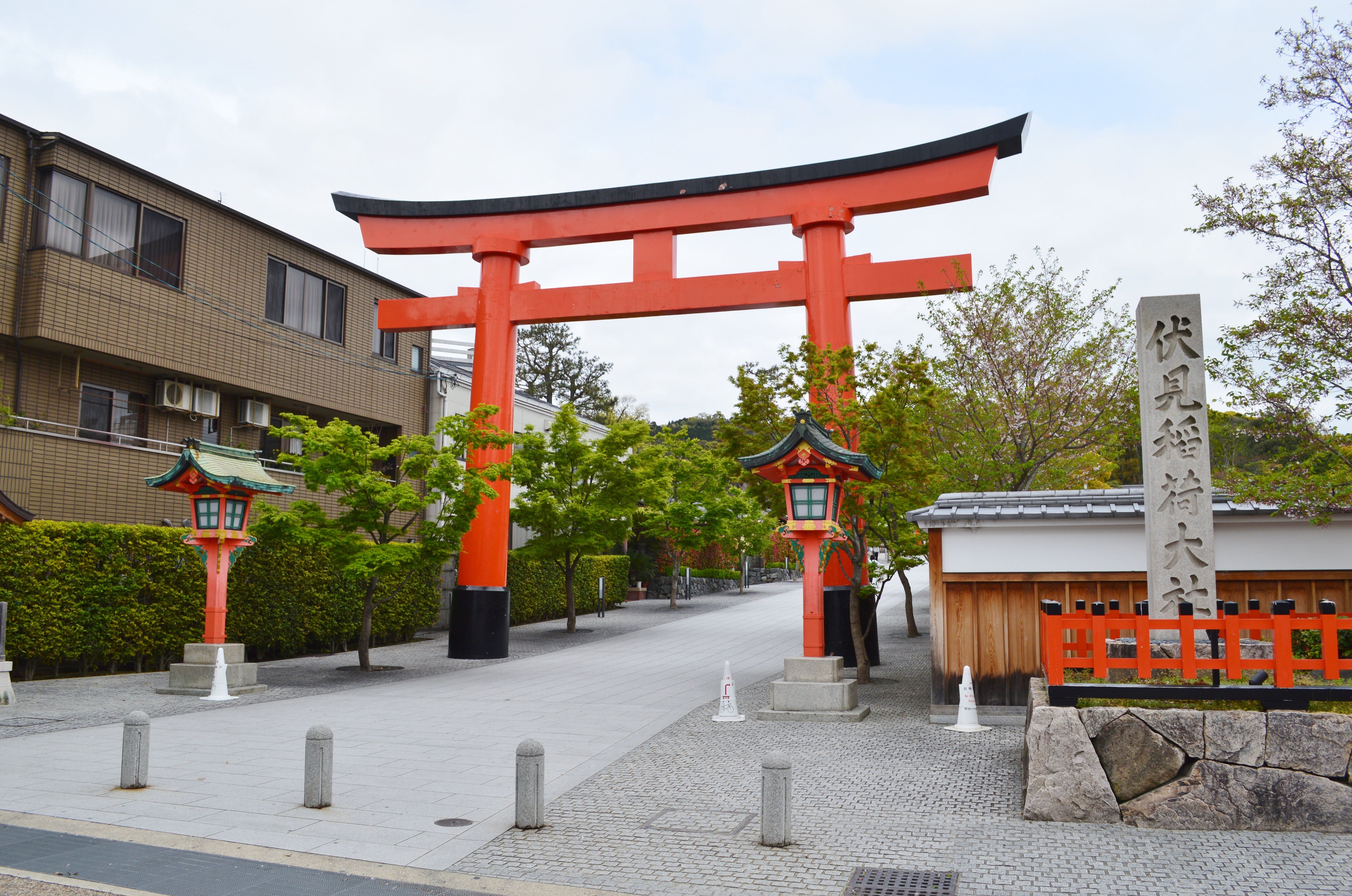 伏見稲荷大社 一番鳥居 Nikon D3200